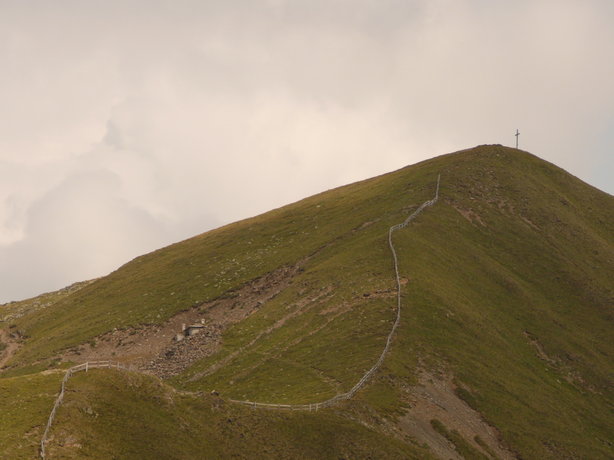 Corno Fana, una cima sopra Dobbiaco